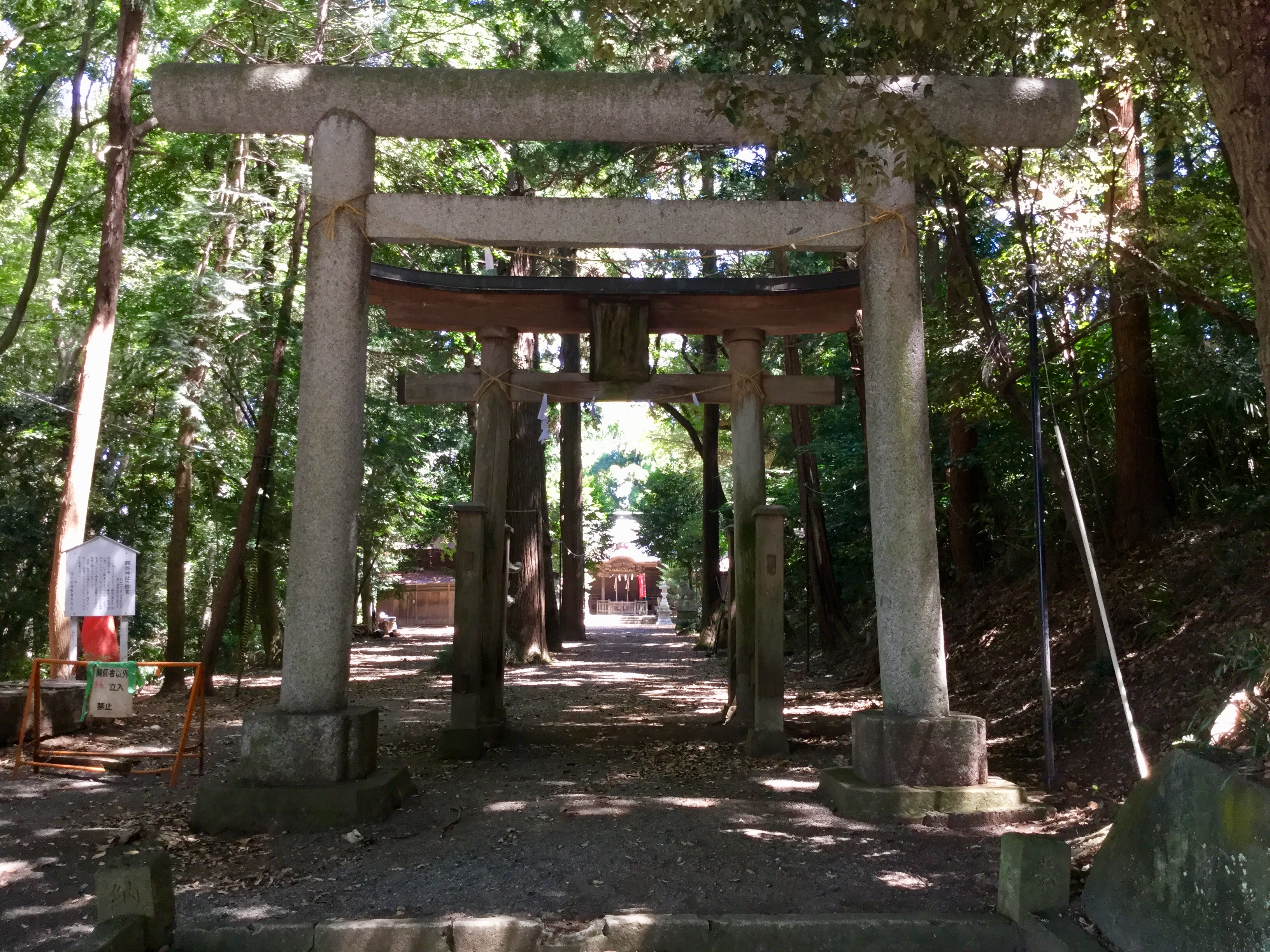 腰掛神社境内